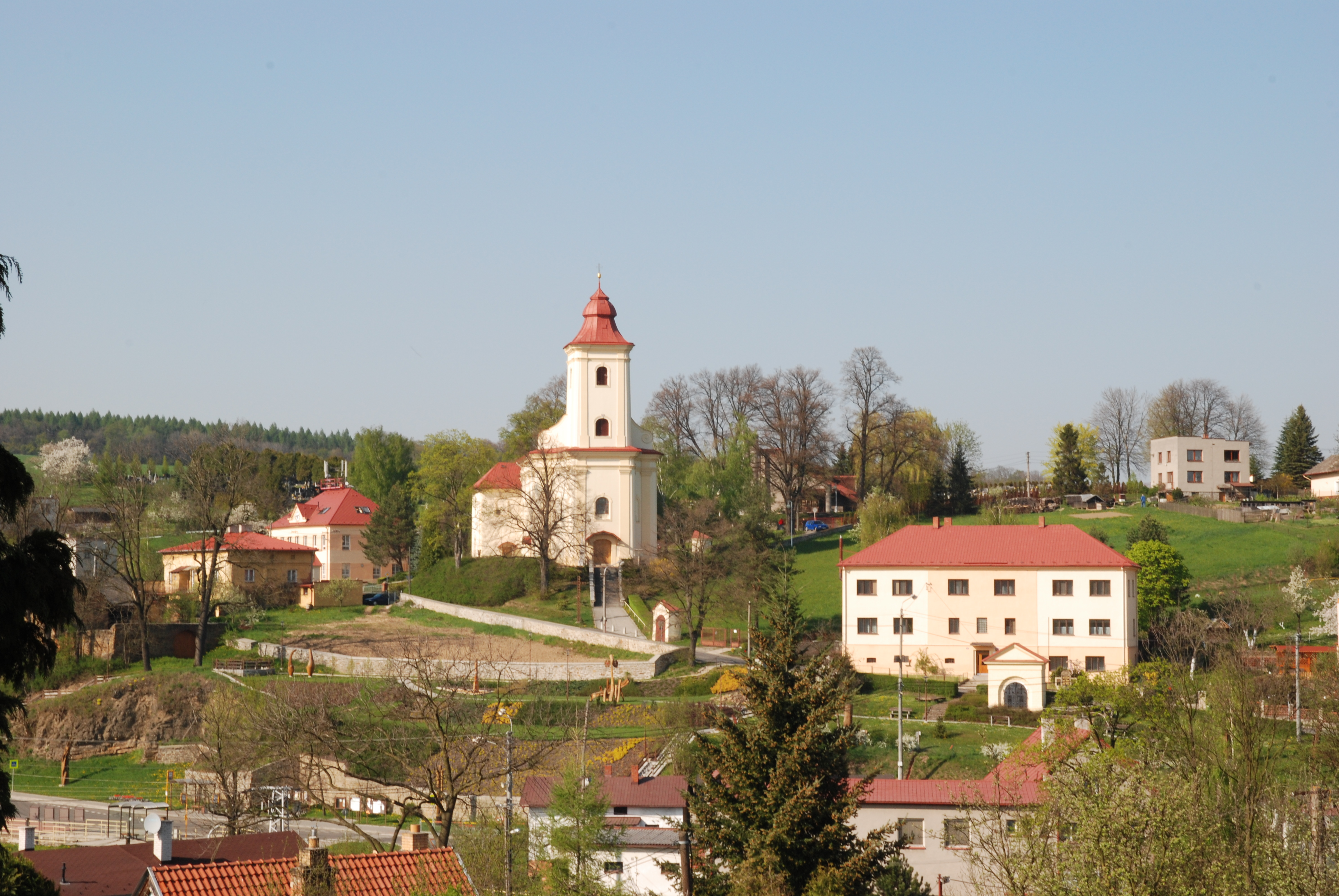 Kostel svatého Jakuba Staršího, Stará Plesná, Ostrava.